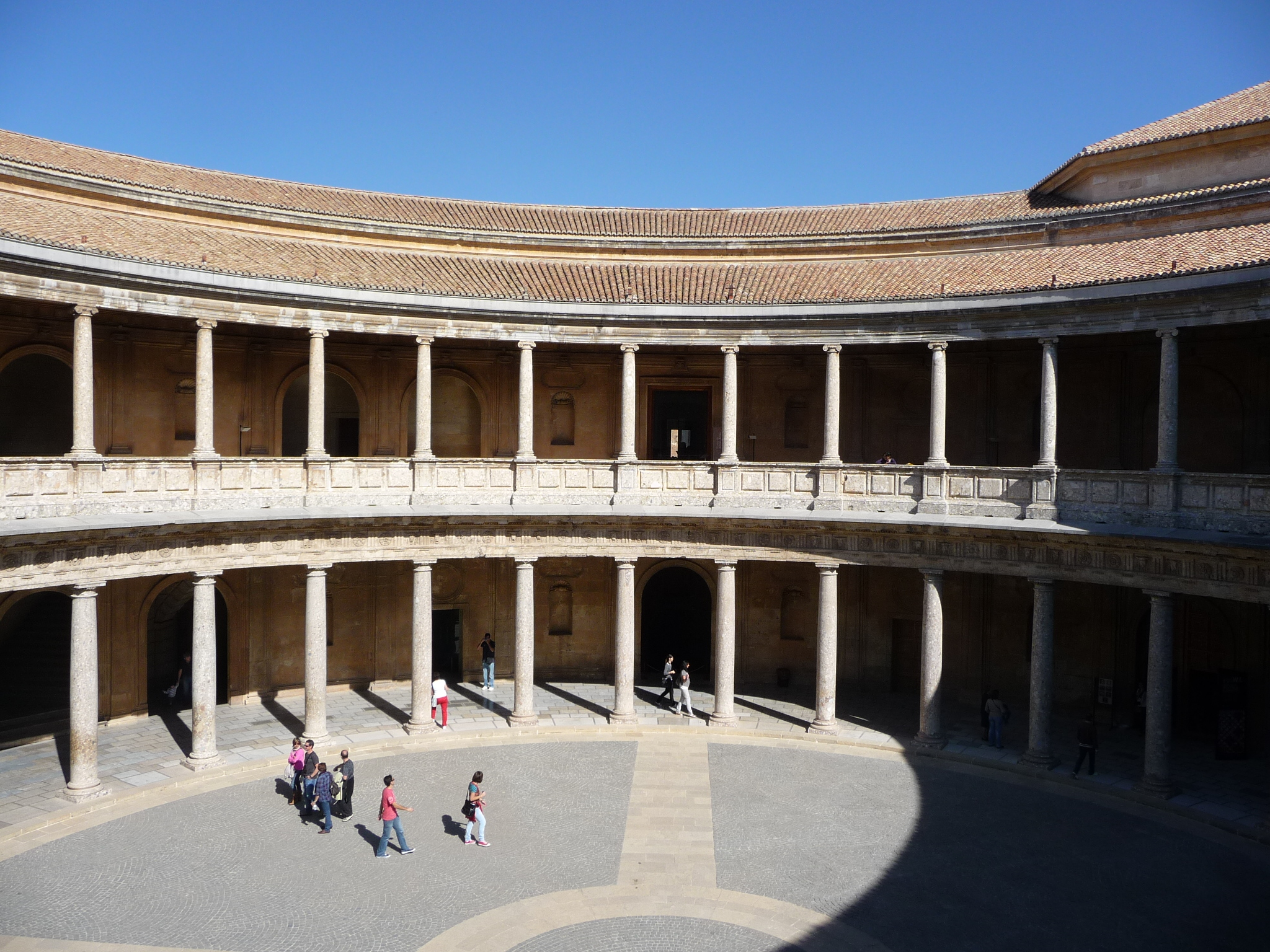 Granada-P1050011.JPG